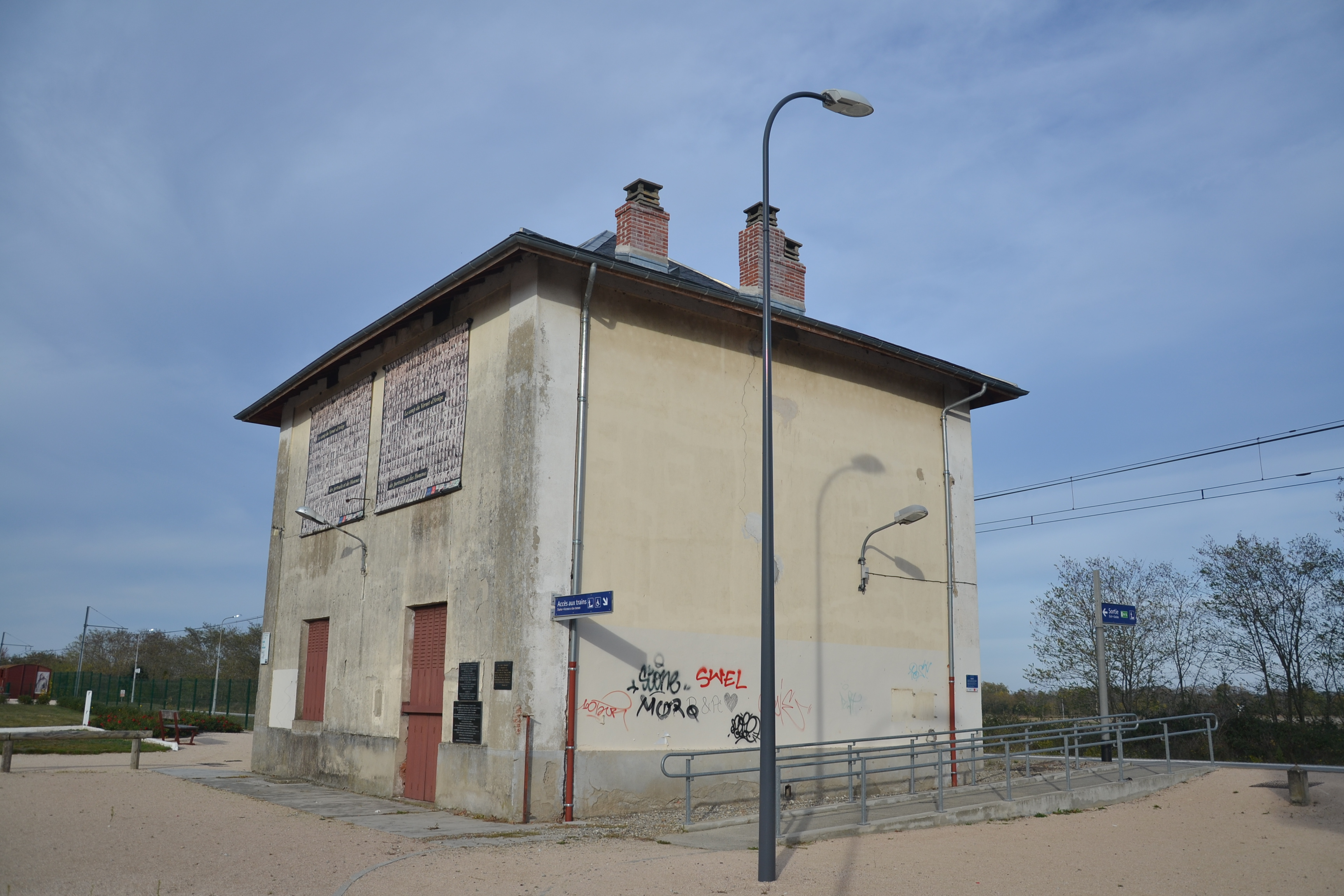 Gare ferroviaire du Vernet-d'Ariège (France).